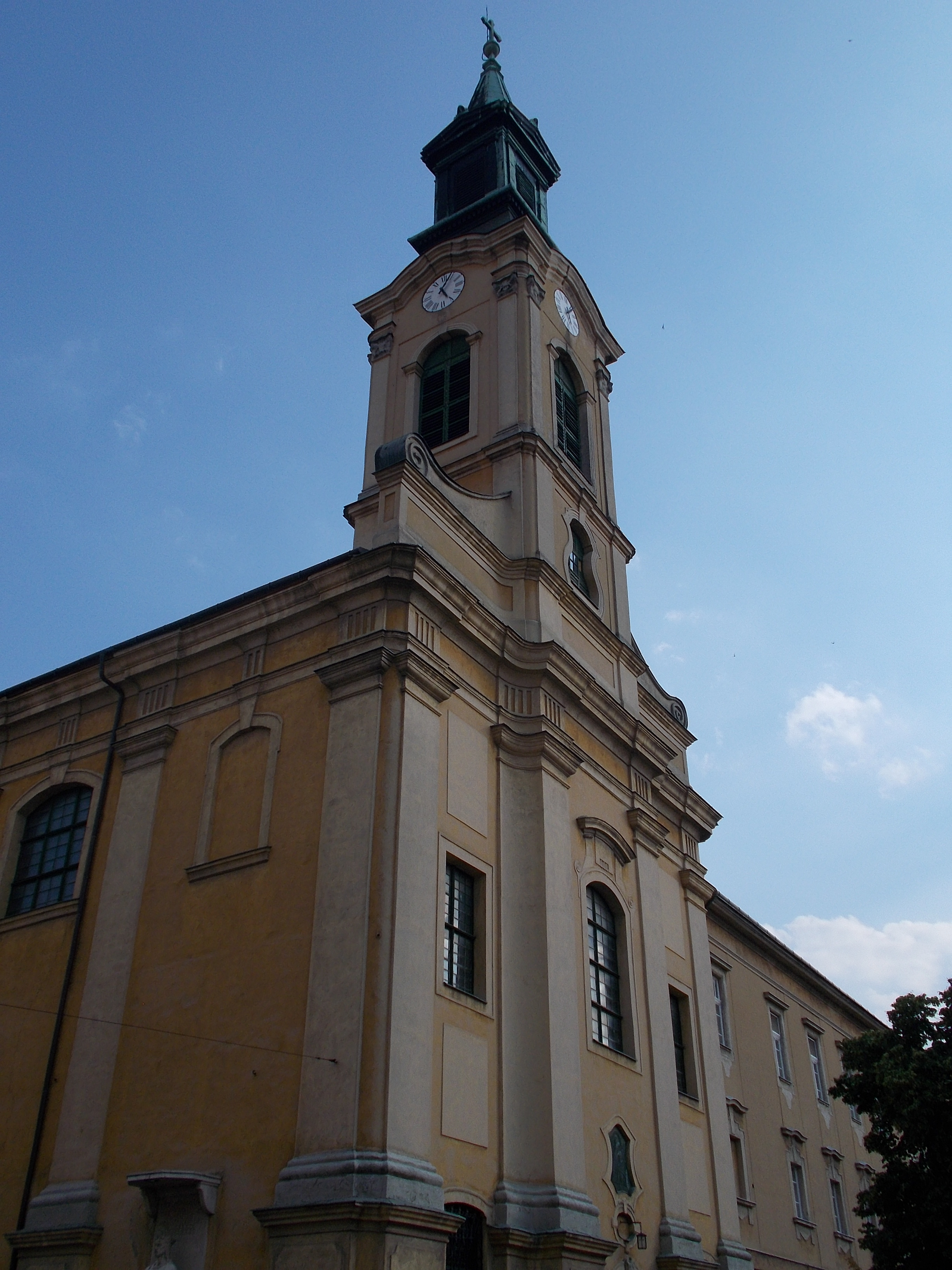 Kármelhegyi Boldogasszony Római katolikus műemlék templom. ID 3883. volt karmelita, majd szemináriumi templom. Barokk, É.-D. fekvésű, középtornyos, épült 1745-1748. A főhomlokzaton toszkán fejezetű óriáspilaszterek, korithoszi fejezettel képzettek. Kétszintes óratorony. A bronzkapuja felette szalagkeretes, váll- és zárókövekkel tagolt, ovális vakablak és falfülke, benne bronz - Madonna a kis Jézussal - domborművel. - Magyarország, Fejér megye, Székesfehérvár, Belváros, Petőfi utca, Kossuth utca sarok. This is a photo of a monument in Hungary. Identifier: 3883